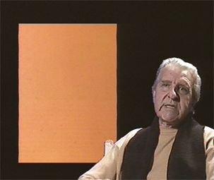 Portrait de Fernand Leduc